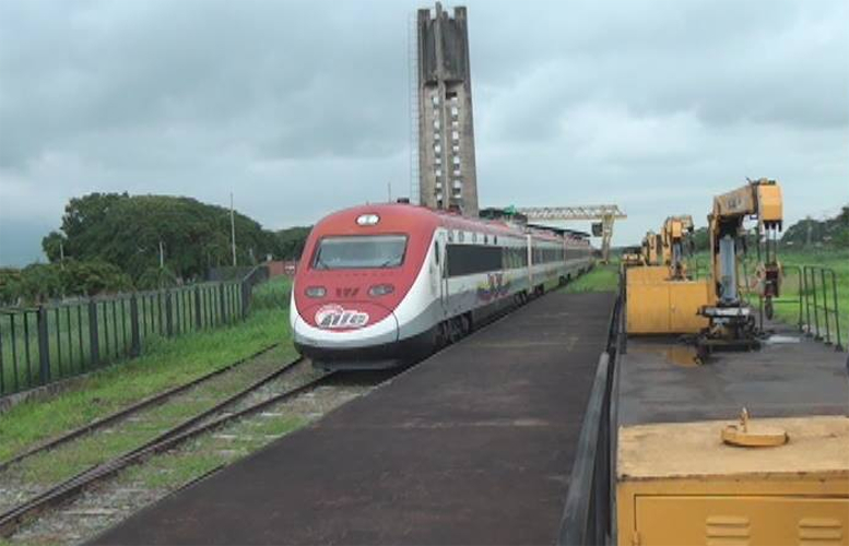 Tren en la estación Chivacoa